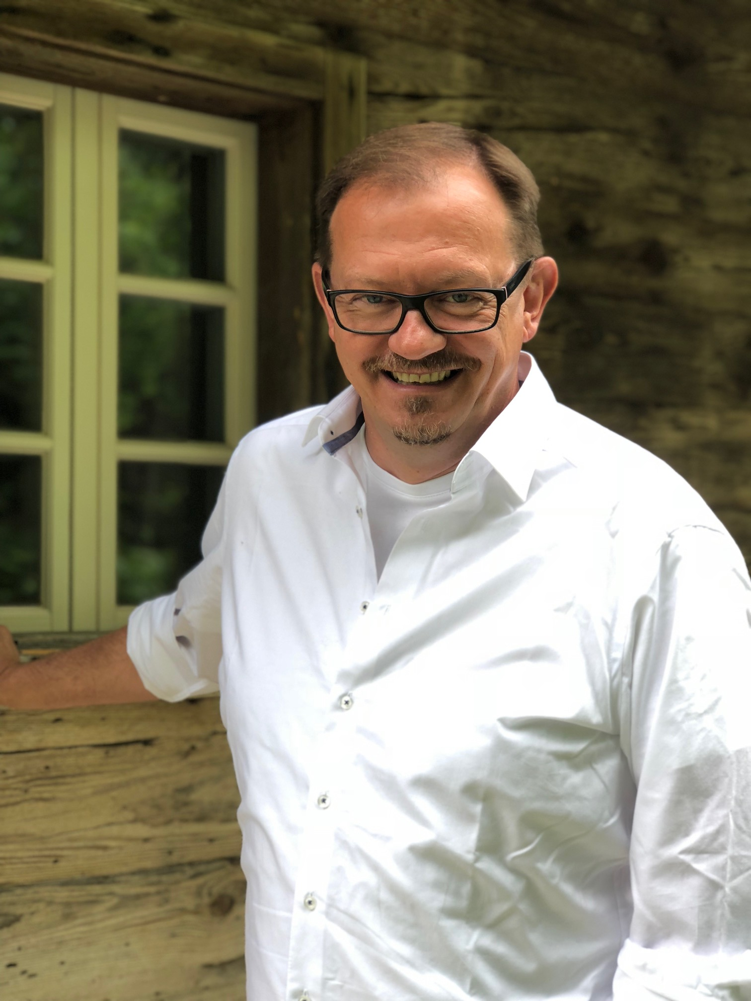 Rudolf Silvan, Abg. zum österreichischen Nationalrat